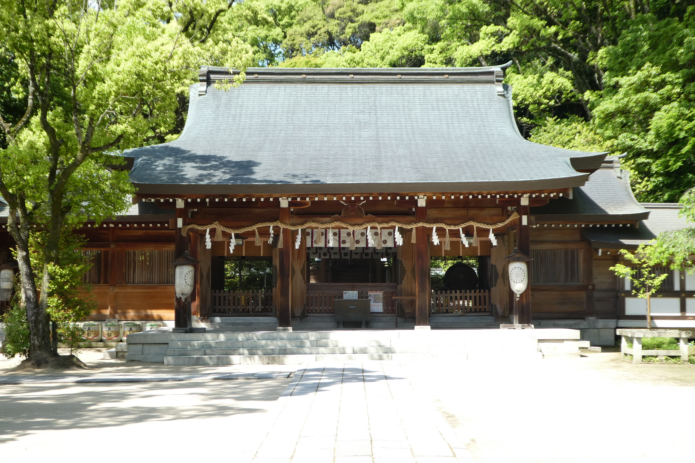 四條畷神社の本殿。